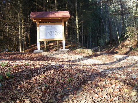 Burggraben der Benzenburg